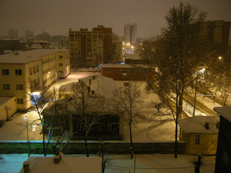 СОУ „Георги Брегов“ – панорамен изглед. Снимка: Петко Манчоров